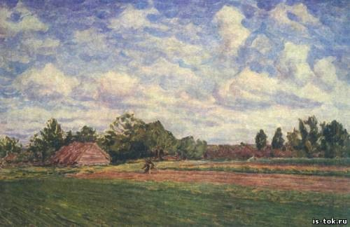 картины Мещерина Николая Васильевича [1864—1916]